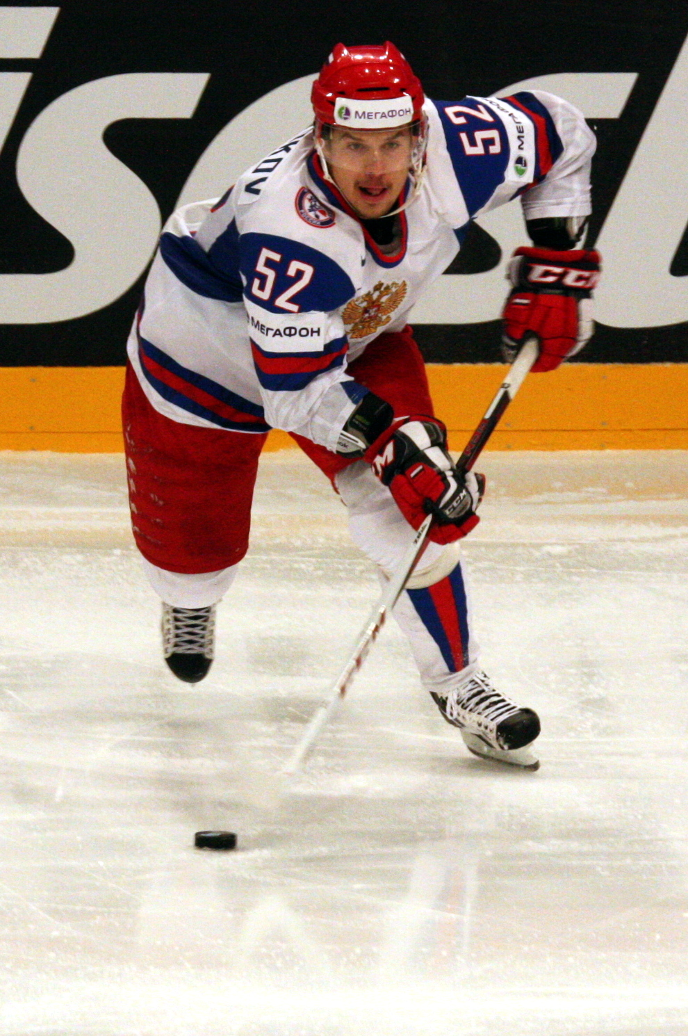 Сергей Широков, ЧМ 2012, 15.05.2012, Россия-Италия, Стокгольм, Швеция